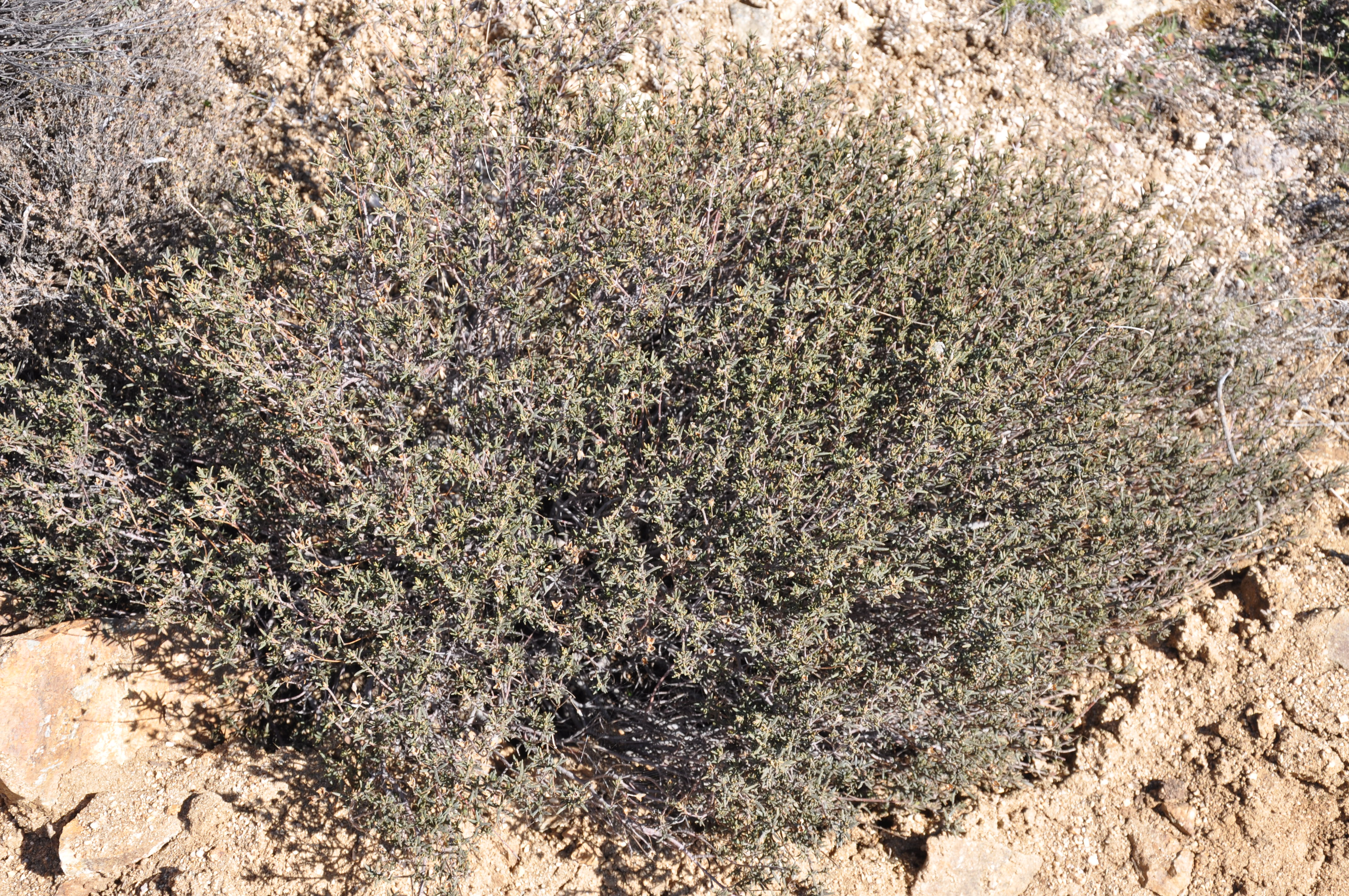 Jaguarcillo (Halimium umbellatum) Amavida, Ávila, España.